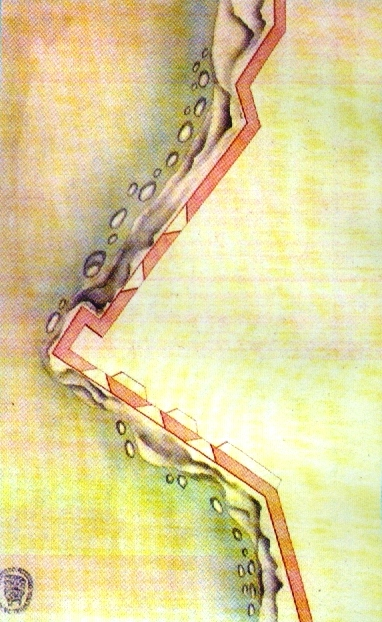 Segundo forte (reduto) da Casa da Salga. MACHADO, Francisco Xavier. "Revista dos Fortes e Redutos da Ilha Terceira" (1772). in MARTINS, José Salgado, "Património Edificado da Ilha Terceira: o Passado e o Presente". Separata da "Atlântida", vol. LII, 2007. p. 30.